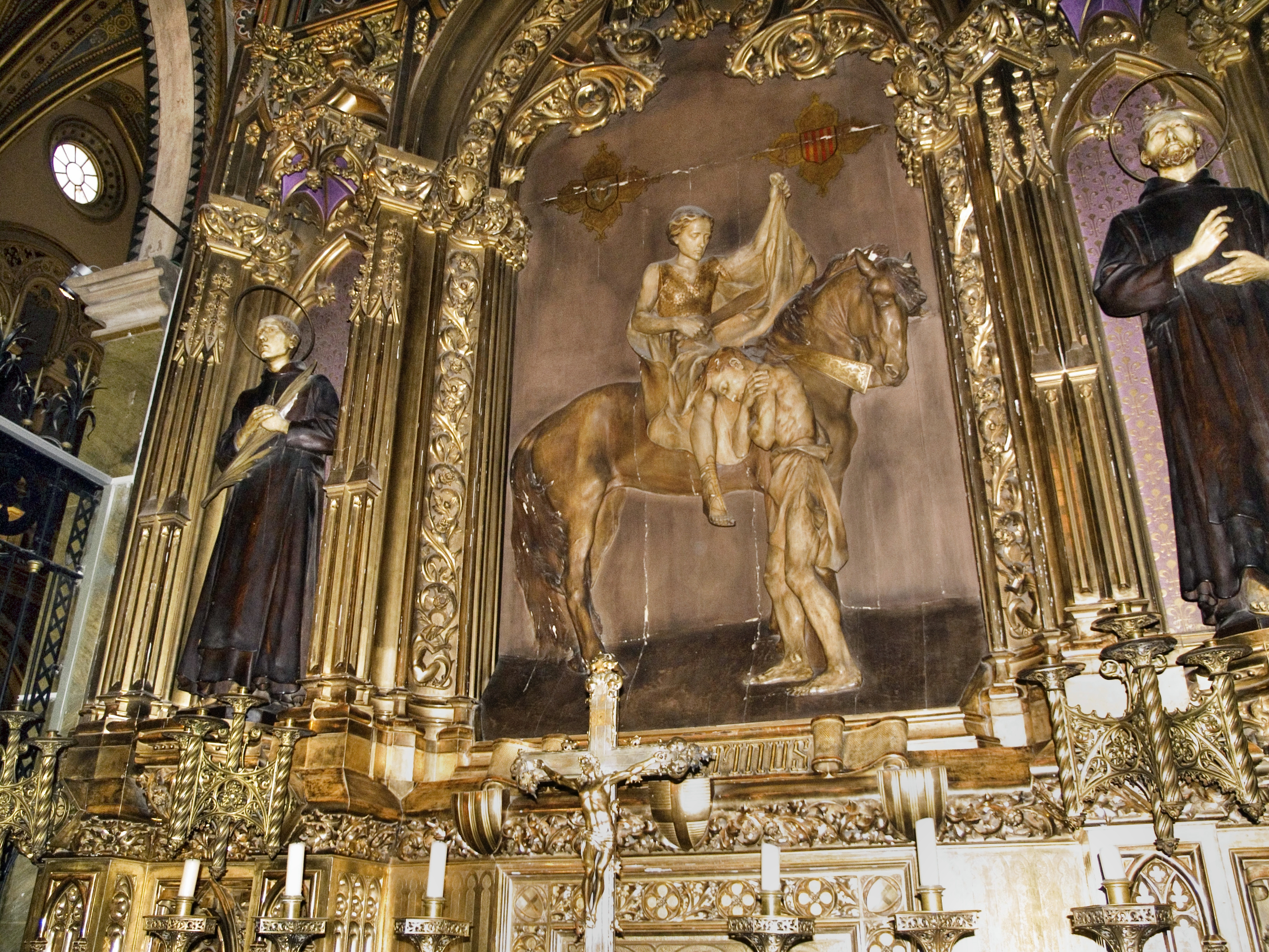 Каталония, монастырь Монсеррат – Базилика Девы Марии (часовня Святого Мартина)